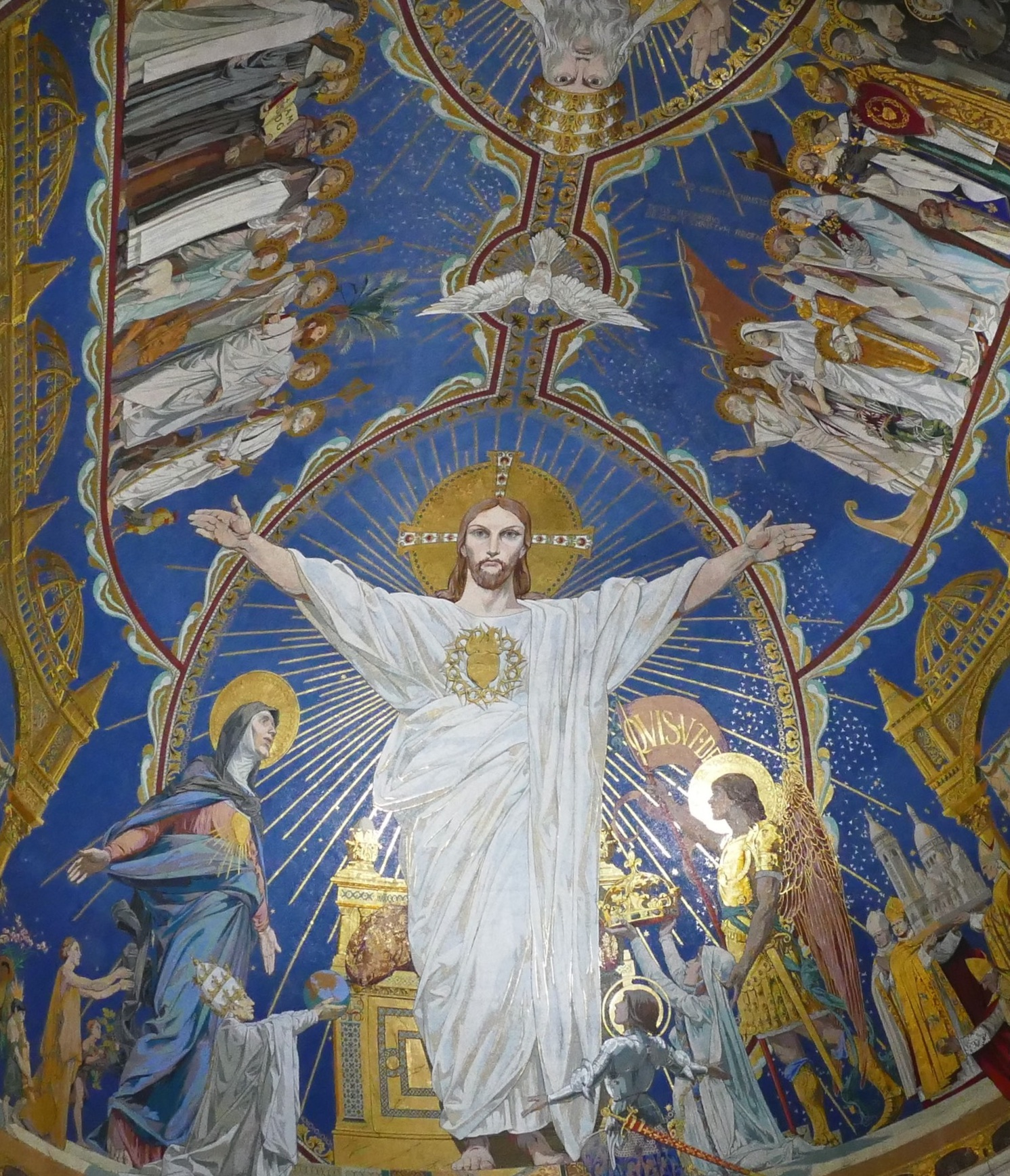 Mosaïque de Luc-Olivier Merson réalisée par l’Atelier Guilbert-Martin (1922), abside de la basilique du Sacré-Cœur de Montmartre.